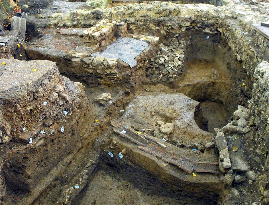 Ausgrabung im Elisengarten im Dezember 2008